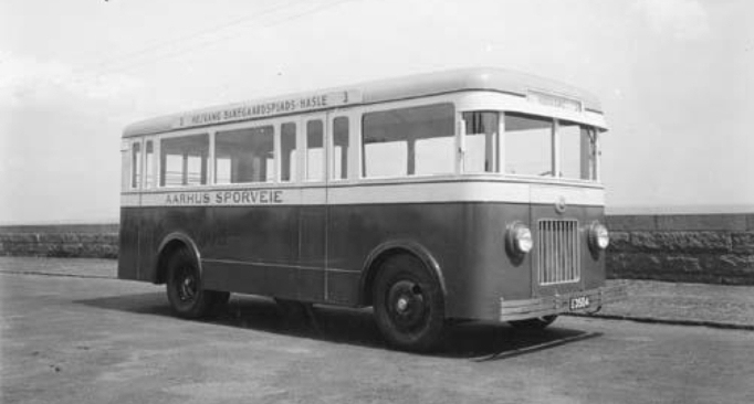 Århus Sporvejes Trambus, beregnet til kørsel på linje 3, 1932. Fotograferet ved østre mole. Fotograf: Hans Andresen Ebbesen Kilde: danskebilleder.dk